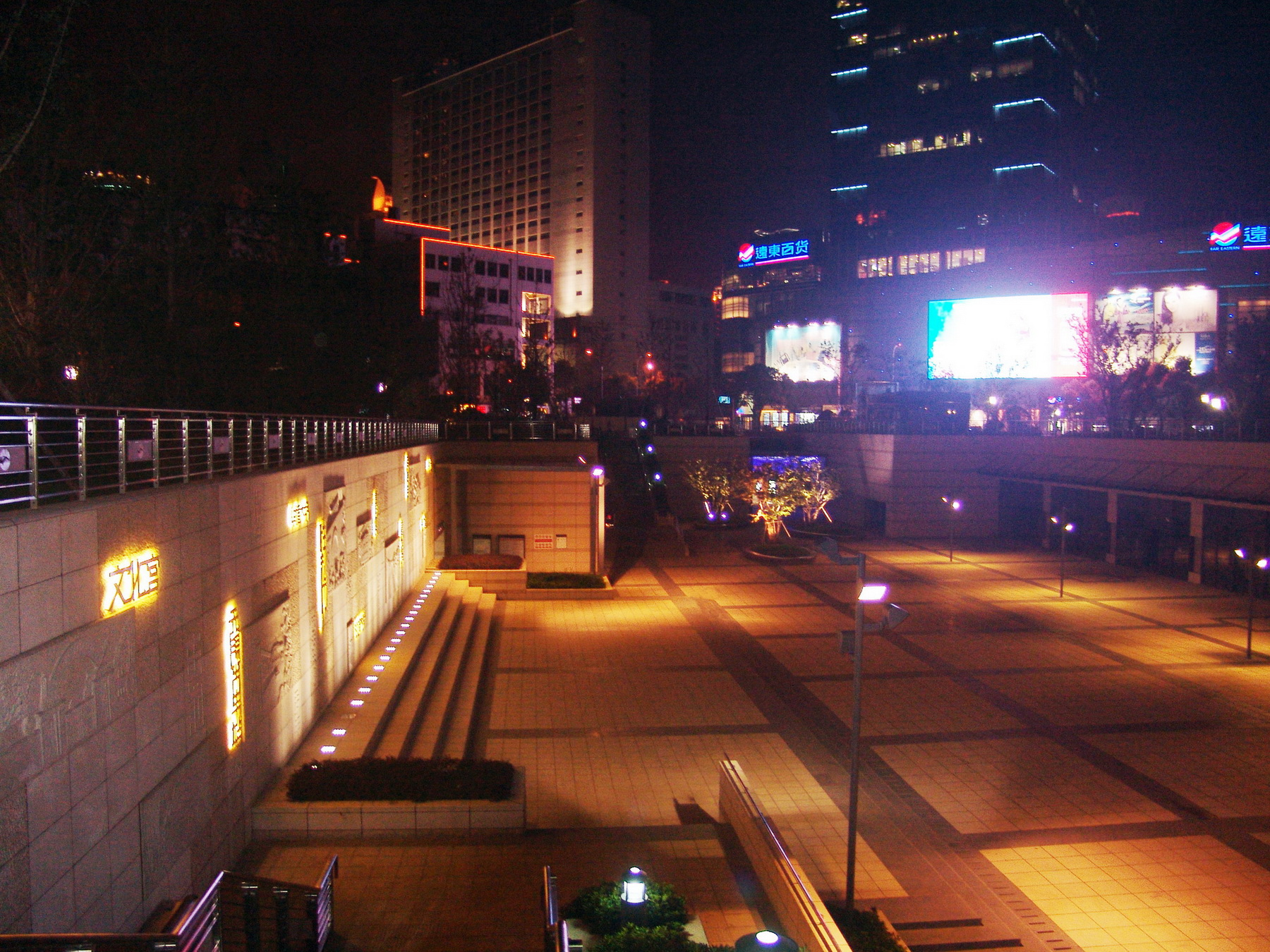 無錫地鐵勝利門站